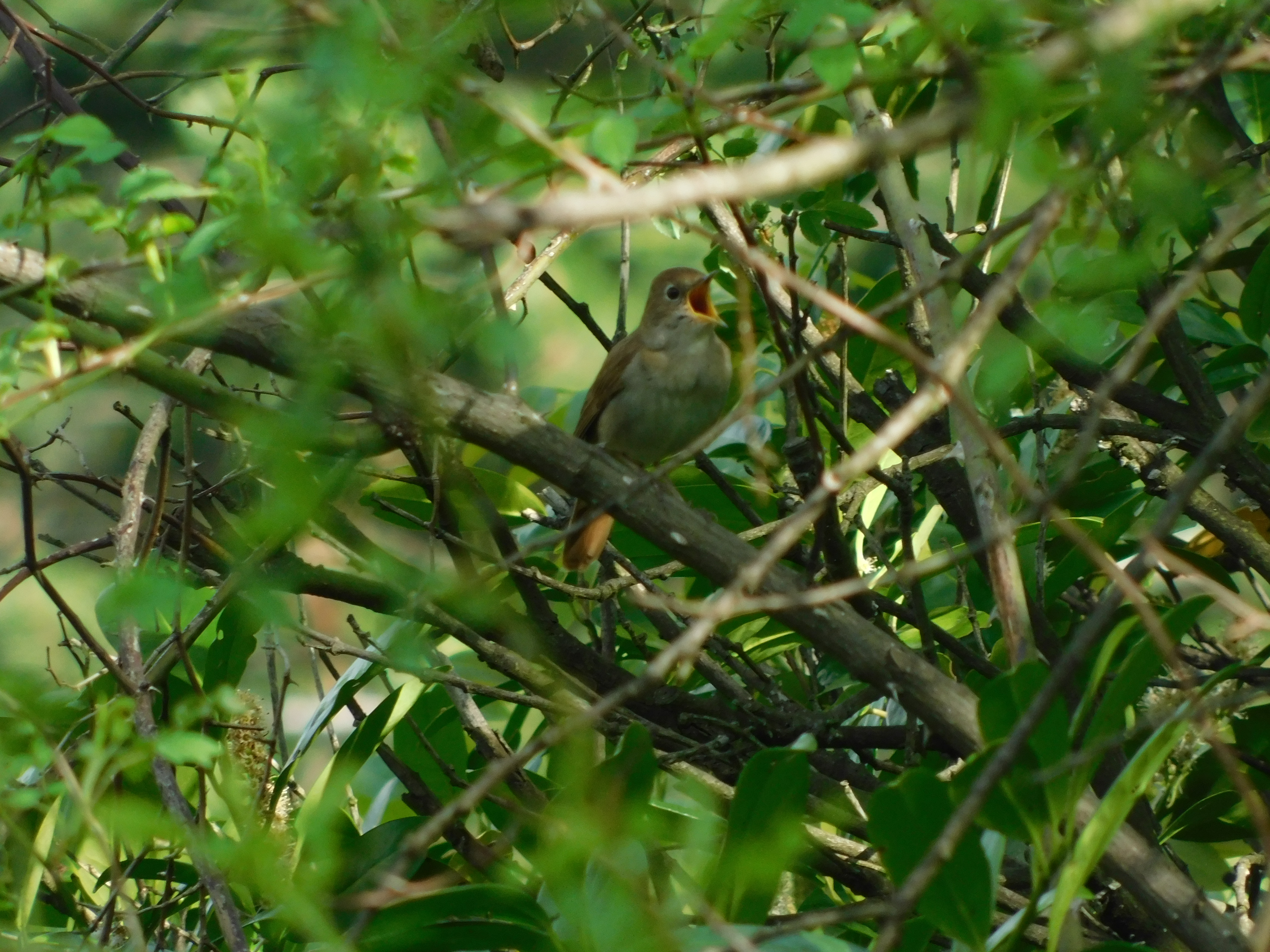 Srpski (latinica): Naseljava zapadnu, centralnu i južnu Evropu, delove Male Azije, jugozapadne Azije i severne Afrike. Izrazita je selica. Zimu provodi u podsaharskoj Africi. Staništa su mu mozaični predeli sa gustim žbunjem i prizemnom vegetacijom, obodi listopadnih šuma, živice, voćnjaci, parkovi i vrtovi u ravnici i pobrđu. Gnezda smešta na tlo gde ih pažljivo sakriva u prizemnoj vegetaciji. Hrani se različitim beskičmenjacima (insekti, gliste), kao i bobicama u periodu pred jesenju seobu. Evropska populacija je stabilna. U Srbiji se gnezdi stabilna populacija, čija se brojnost procenjuje na 350.000–530.000 parova (Puzović et al 2015).